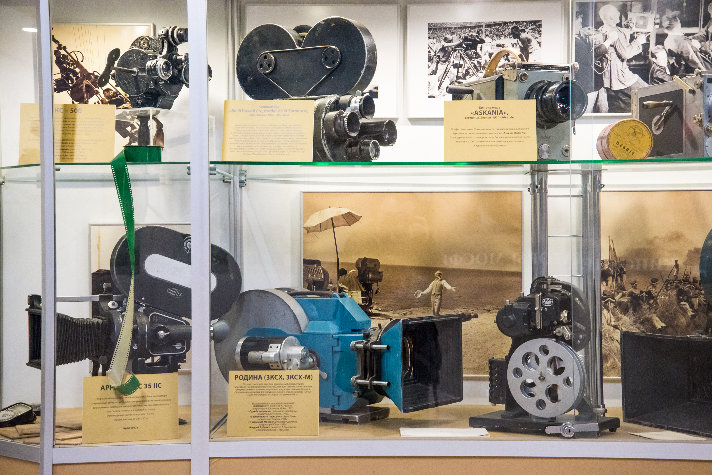 Кинокамера Родина ЗКСХ в музее Мосфильма. Использовалась для съёмок фильмов "Судьба человека", "9 дней одного года", "Андрей Рублёв", "Я шагаю по Москве"